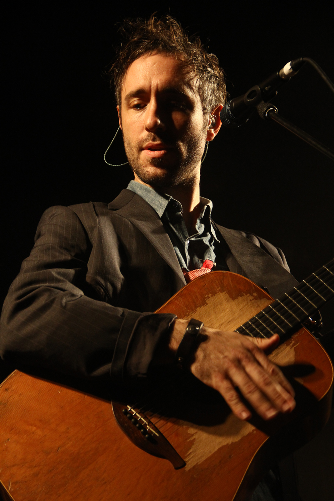 Charlie Winston au Festival Chorus des Hauts de Seine 2012